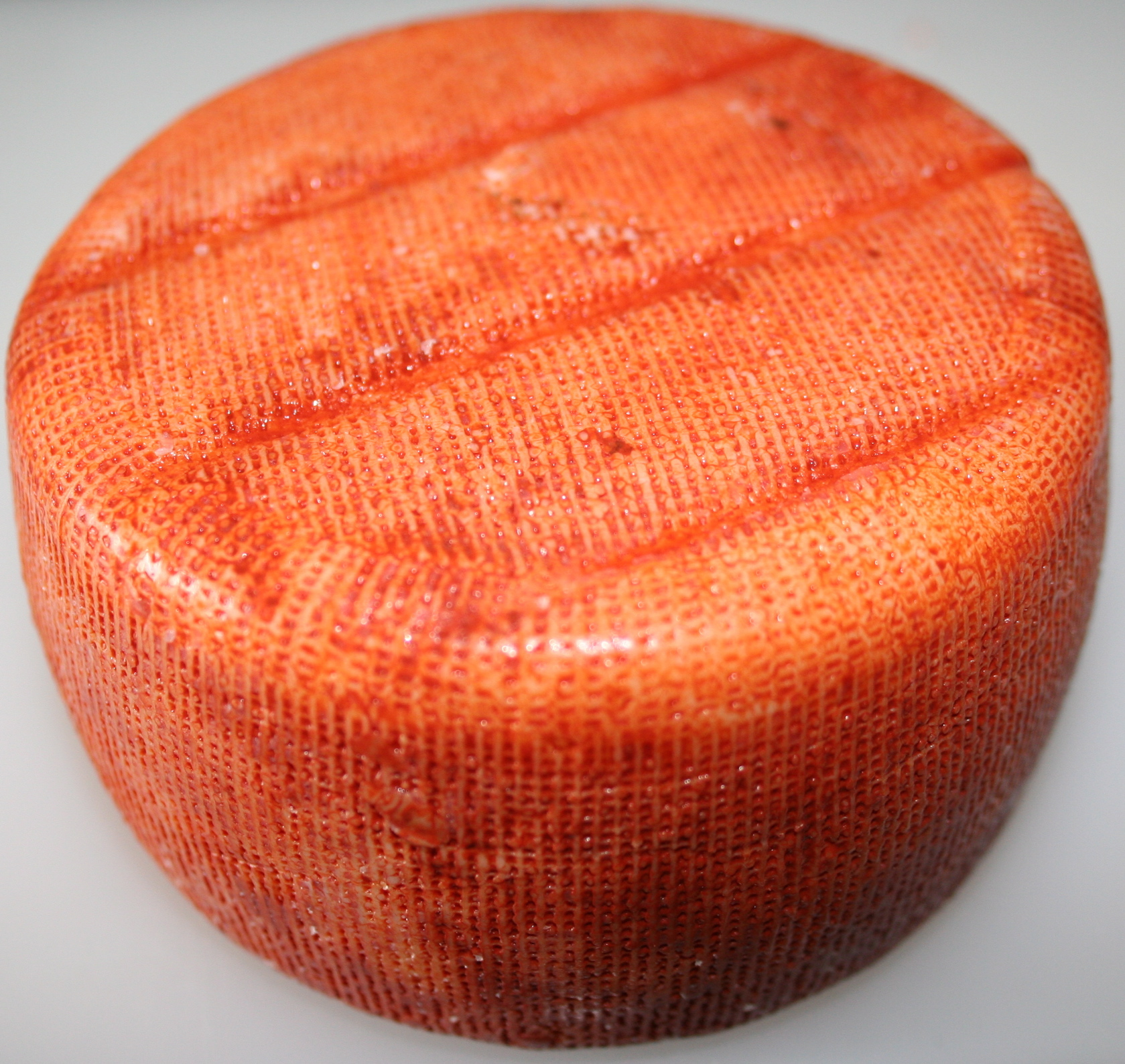 Queso asturiano de Cueva de Mar